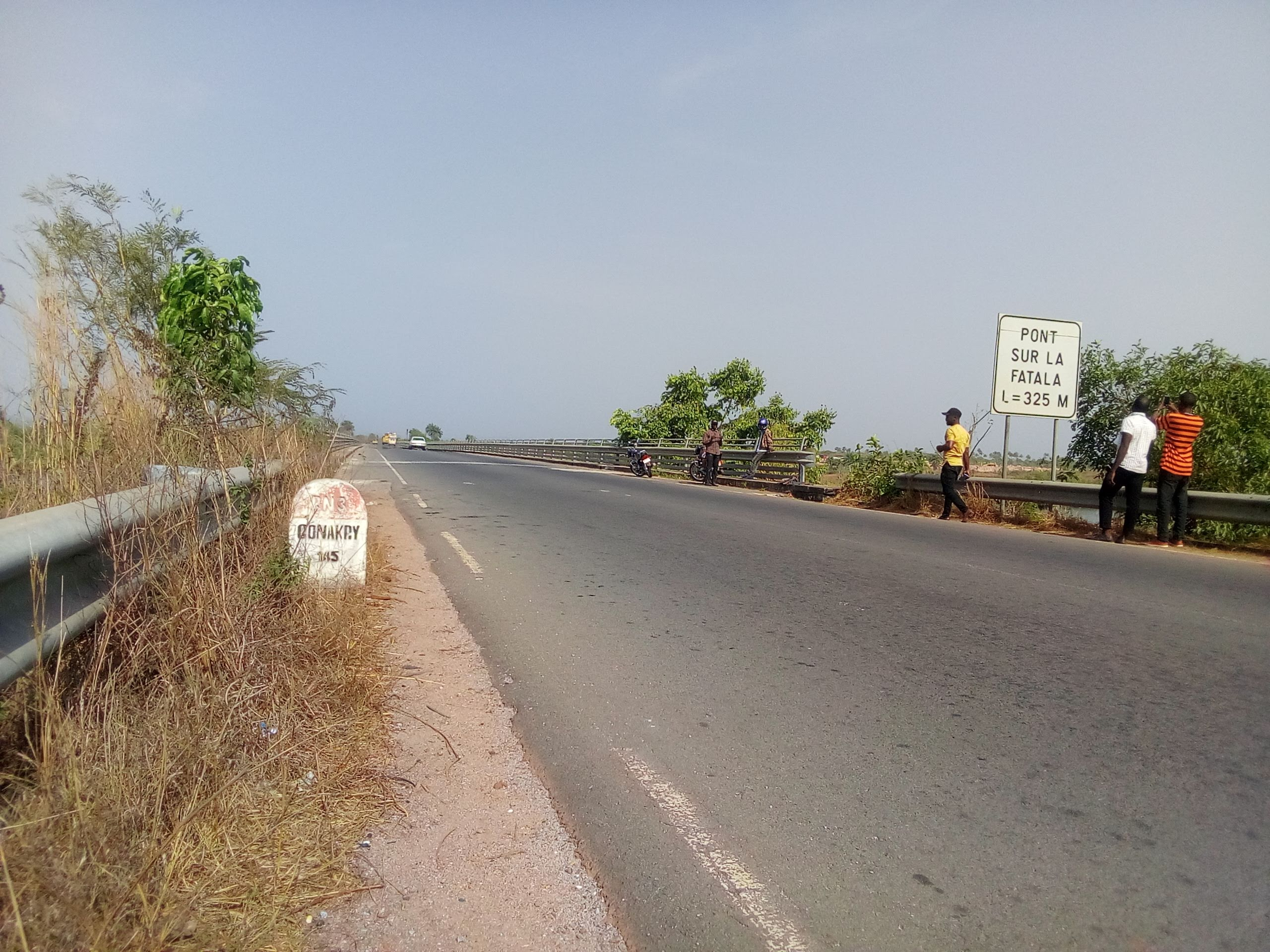 Pont de Fatala Boffa This is an image with the theme "Africa on the Move or Transport" from: Guinea